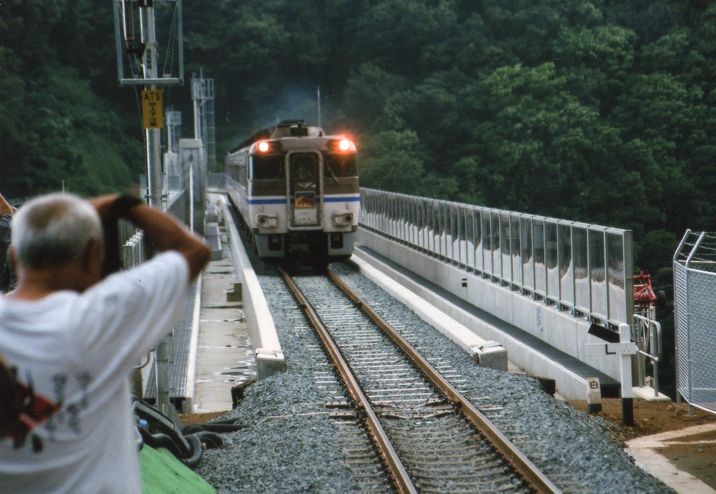 2010年8月12日に運用を開始した余部橋りょうを通過する特急「はまかぜ」。当日撮影したものを2010/9/15にスキャン。